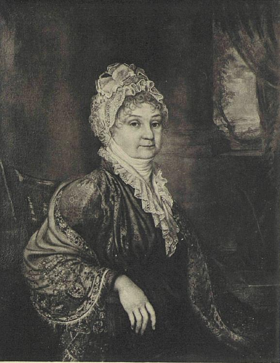 Екатерина Ивановна Козицкая (1746—1833), ур. Мясникова.